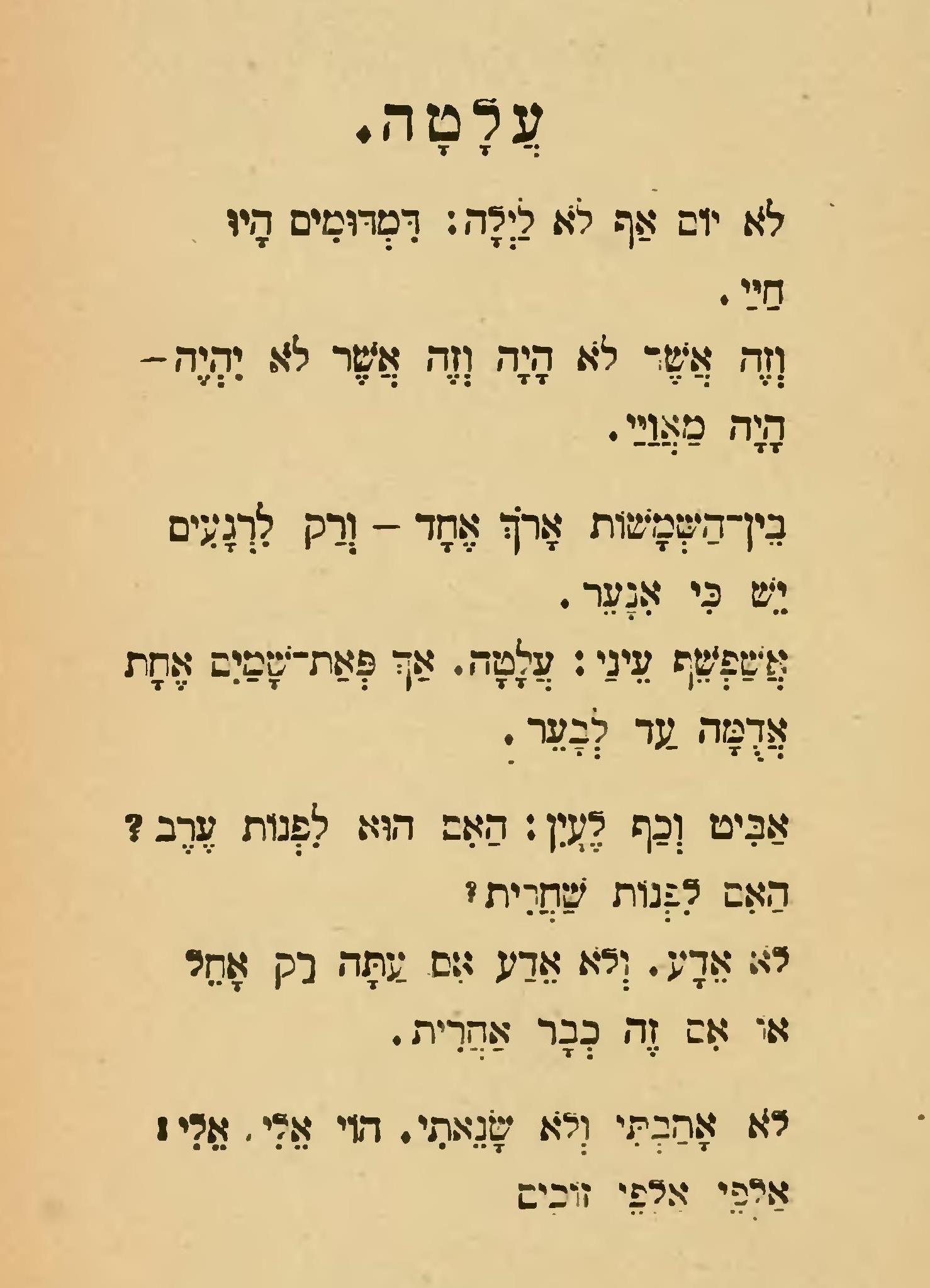 השיר עלטה מתוך כתבי דוד פרישמן